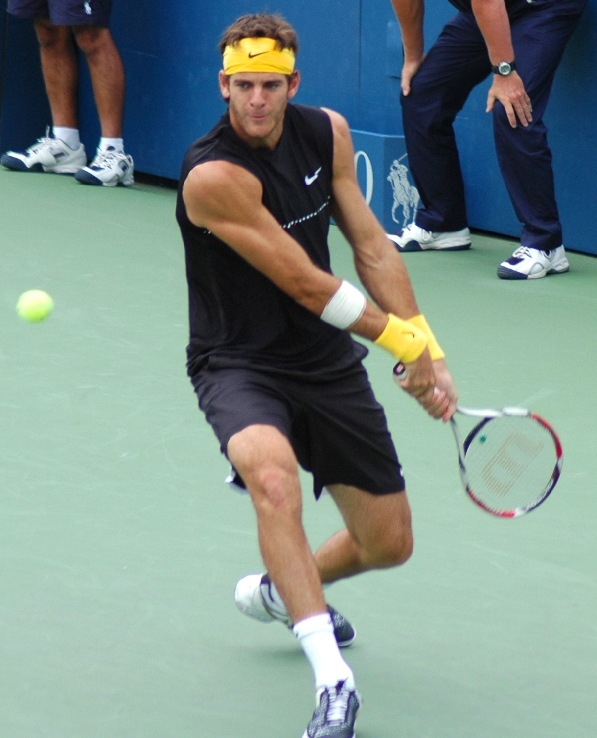 Juan Martin Del Potro US Open 2009